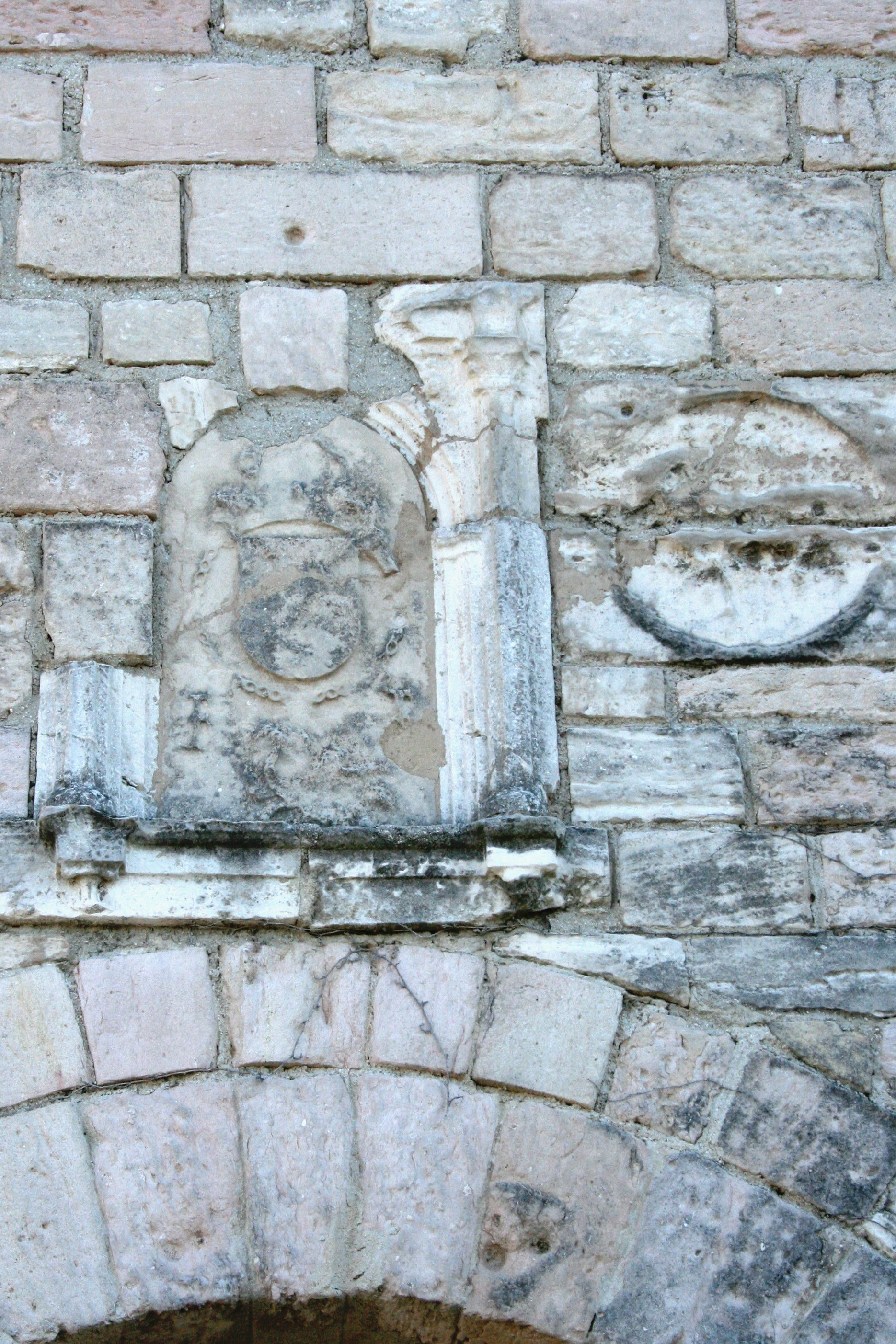 Ecusson de François Ier situé au dessus d'une porte à la basilique Notre-Dame de la Garde à Marseille.